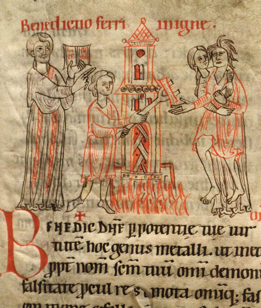 Die Probe des glühenden Eisens. Bei dieser Form des Ordals musste ein glühendes Eisen angefasst und ein Stück weit getragen werden. Ausschnitt aus einer Seite des Rituale in der Stiftsbibliothek Lambach. Cml LXXIII. f. 64v, 72r (Ende des 12. Jahrhunderts)